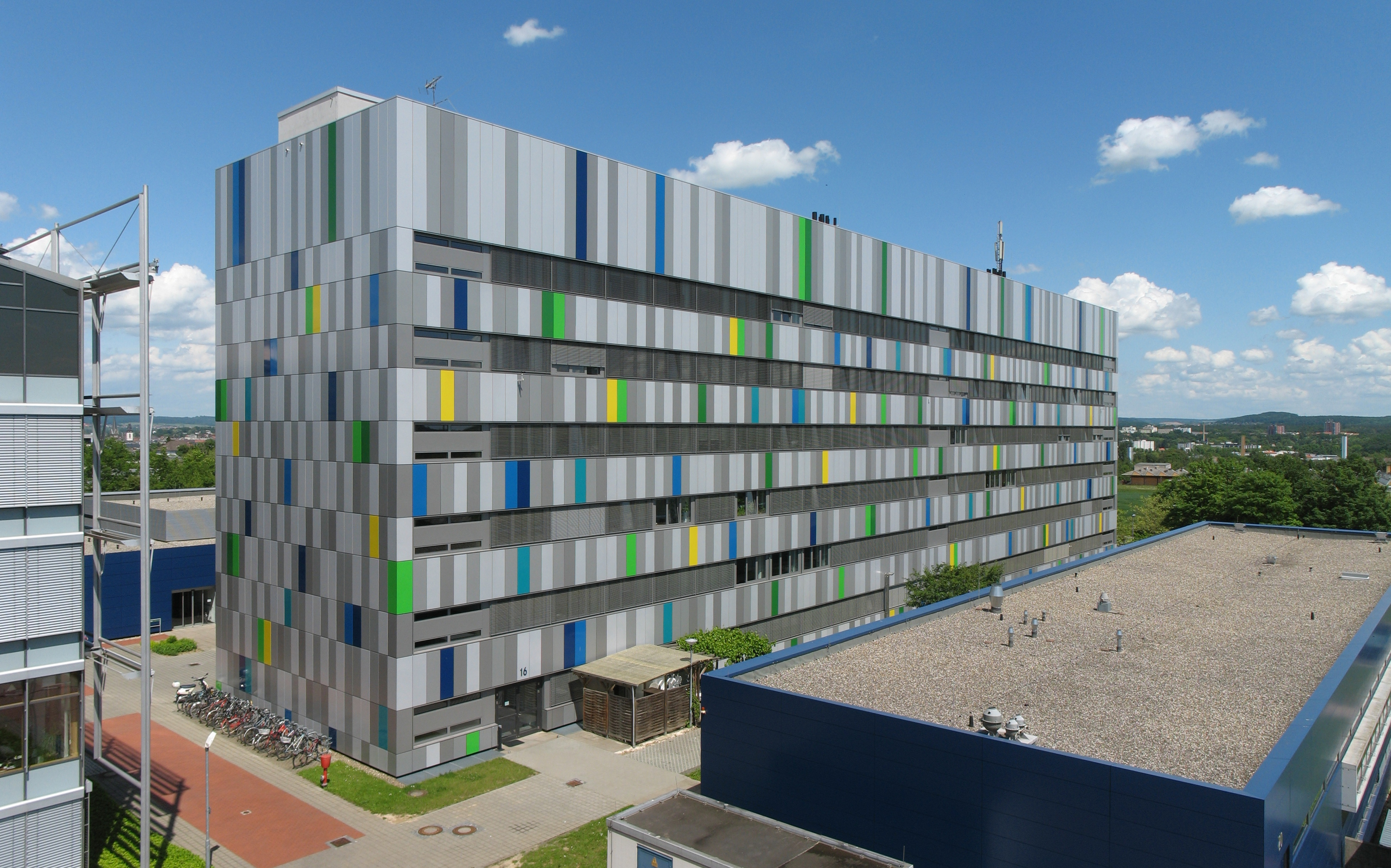 Das Physikgebäude auf dem Universitätscampus Heinrich-Buff-Ring in Gießen.